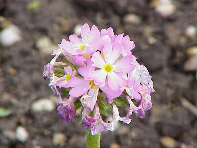 Species: Primula burmanica Family: Primulaceae Image No. 1